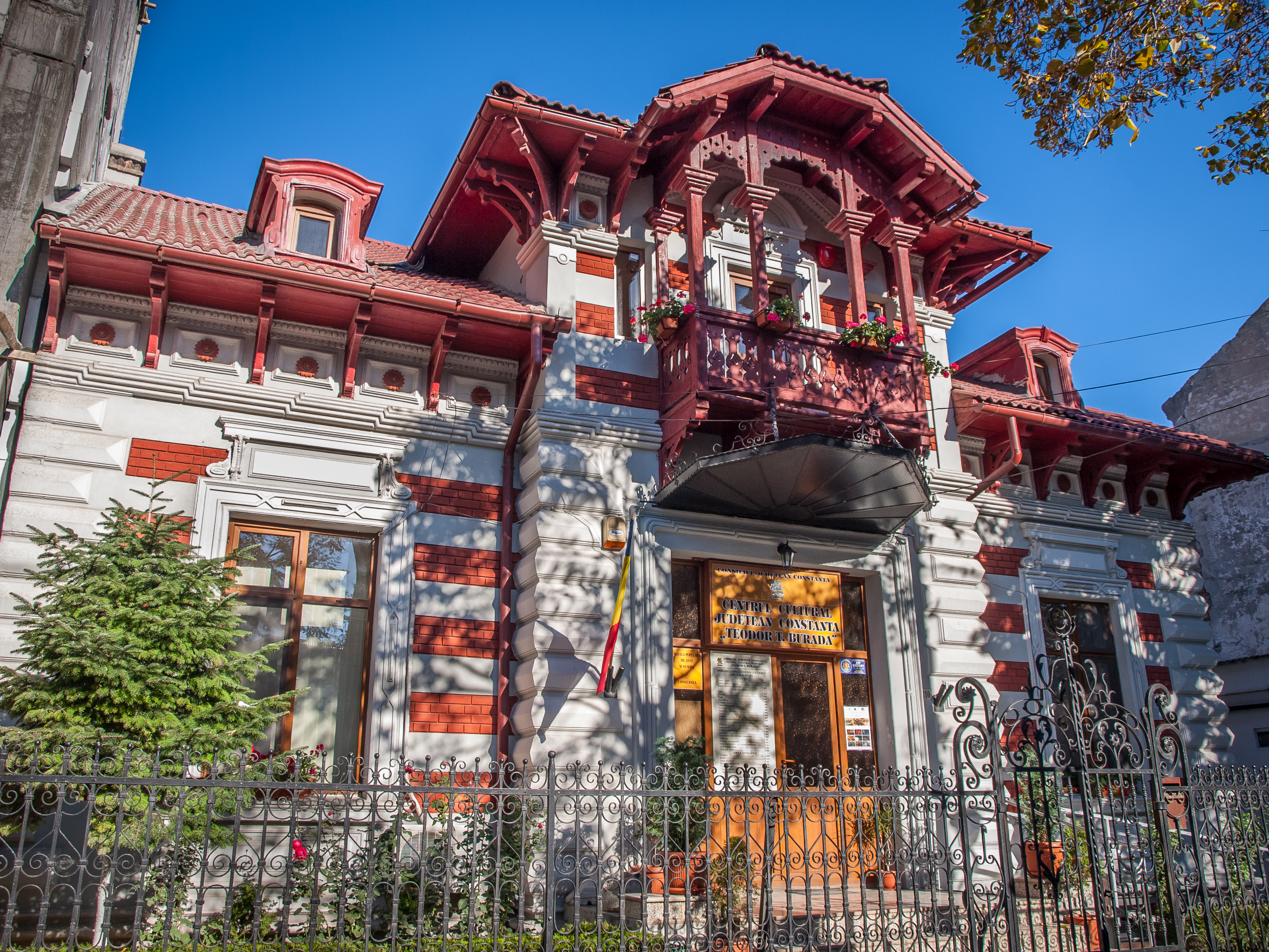 Casa „Ion Bănescu” din Constanța se află pe Bd. Tomis 110.